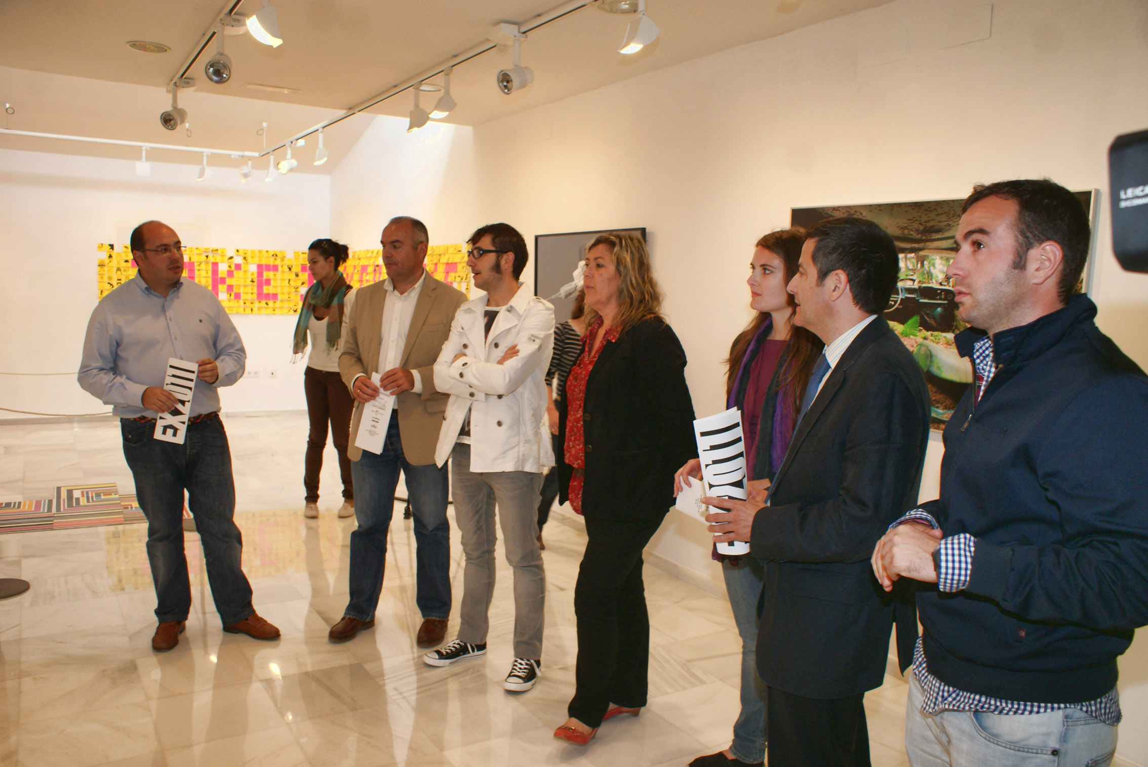 Inauguración de una exposición dentro del festival Explum 2011